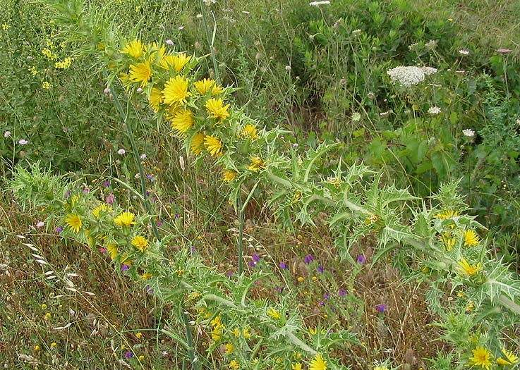 Scolymus maculatus (scolyme taché) Photo prise à Perpignan en juin 2004 Jean Tosti 2005